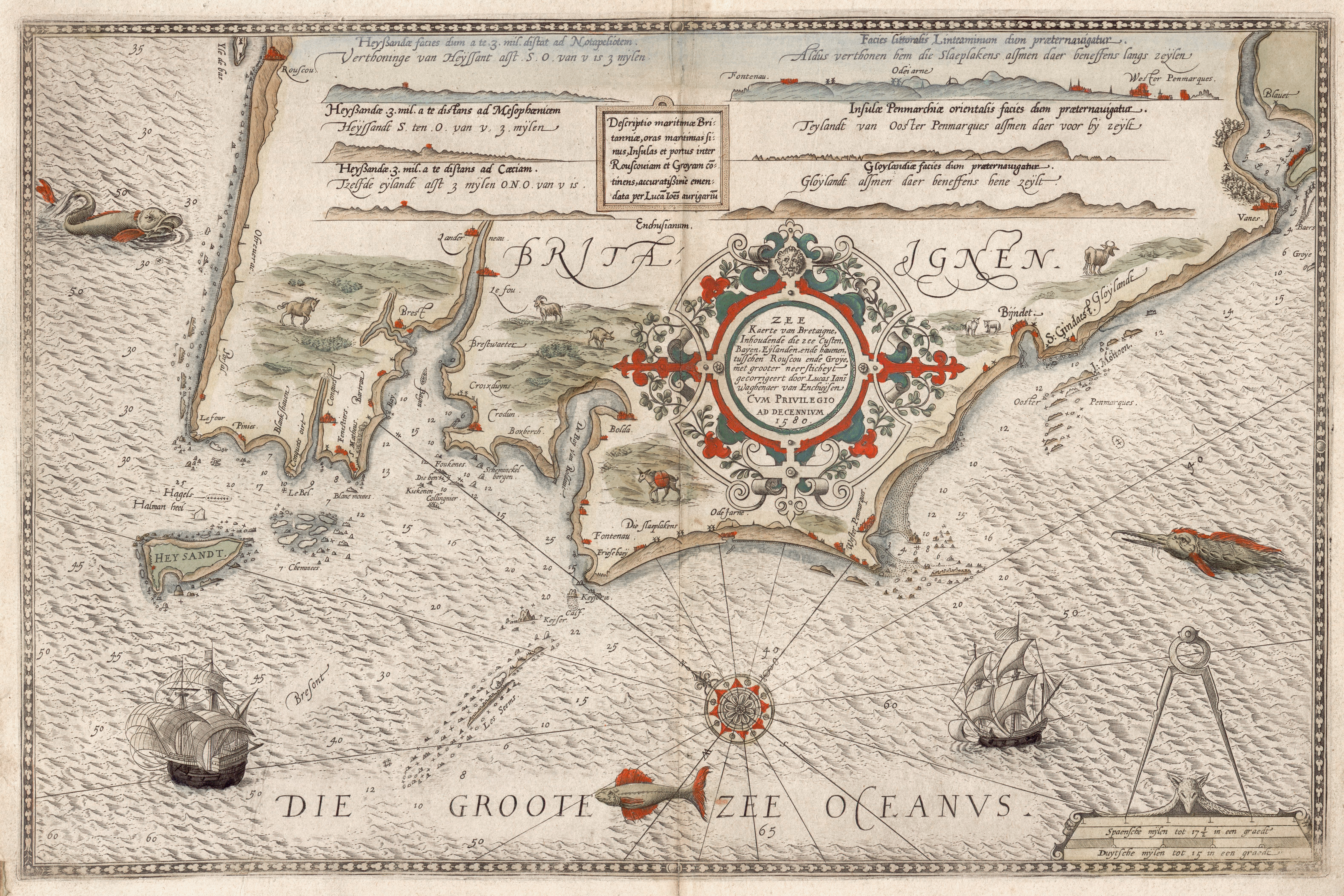 Titre : Britaignen – Zee Kaerte van Bretaigne Inhoudende die zee custen Bayen… Cum privilegio ad decennium 1580.Carte marine aquarellée, du XVIe siècle, représentant l'ouest de la Bretagne. Cette carte est extraite du premier atlas maritime imprimé au monde, l'atlas Spieghel des Zeevaerdt (Miroir de navigation) du cartographe et pilote hollandais Waghenaer. La planche est issue de l’édition latine de 1586. Les écritures sont en hollandais, en français et en latin (Yle de bas (Île de Batz), Roscou (Roscoff), Brest, Heysandt (Ouessant), Bolada (Douarnenez) jusqu'à Vanes (il ne s’agit pas de Vannes, mais de Larmor à l’embouchure de la rade du Blavet).